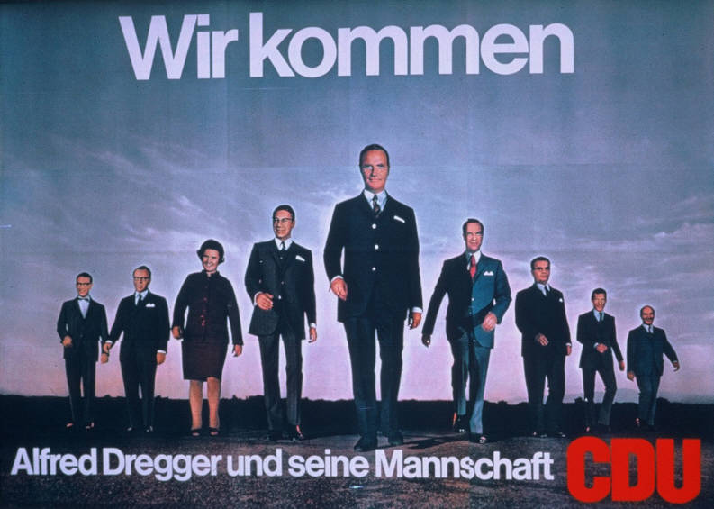 Wir kommen Alfred Dregger und seine Mannschaft CDU Abbildung: Dregger und seine Mannschaft Kommentar: Sog. Django-Plakat; kein Originalplakat vorhanden! Vgl. Plakate Nr. 10-007: 371 und 10-005: 350 sowie 10-012:301. Plakatart: Kandidaten-/Personenplakat mit Porträt Objekt-Signatur: 10-007 : 301 Bestand: Landtagswahlplakate Hessen (10-007) GliederungBestand10-18: Landtagswahlplakate Hessen (10-007) » CDU Lizenz: KAS/ACDP 10-007 : 301 CC-BY-SA 3.0 DE